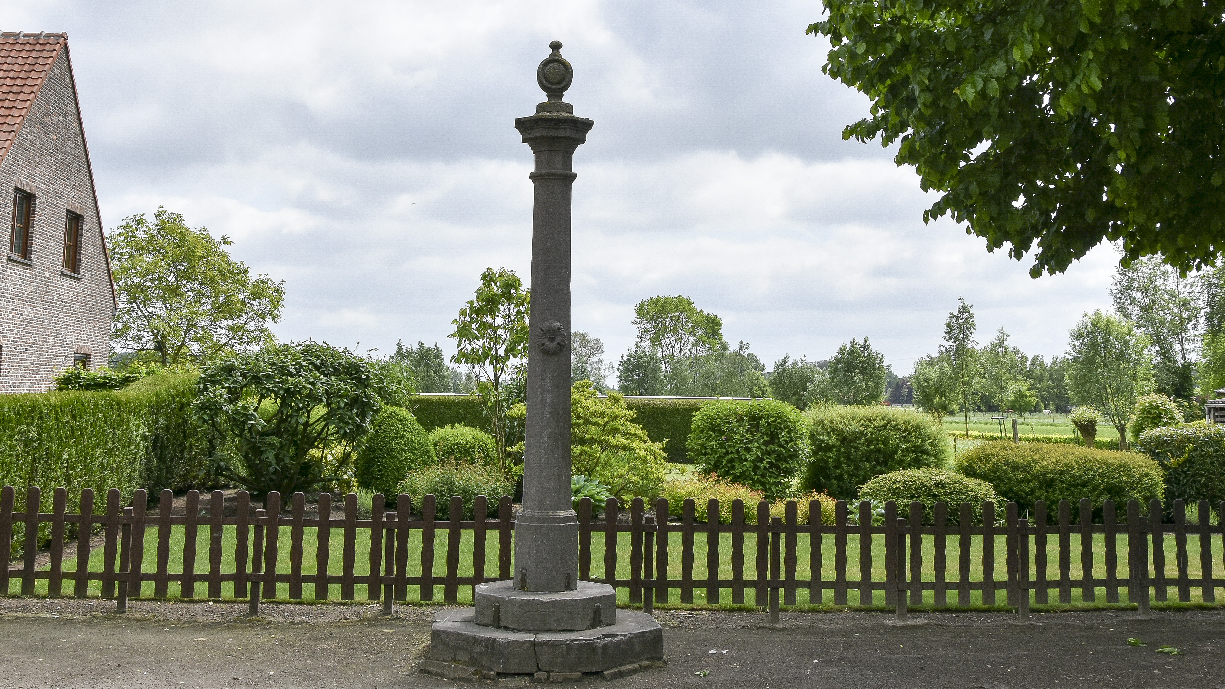 De schandpaal uit de 18e eeuw te Mendonk, België